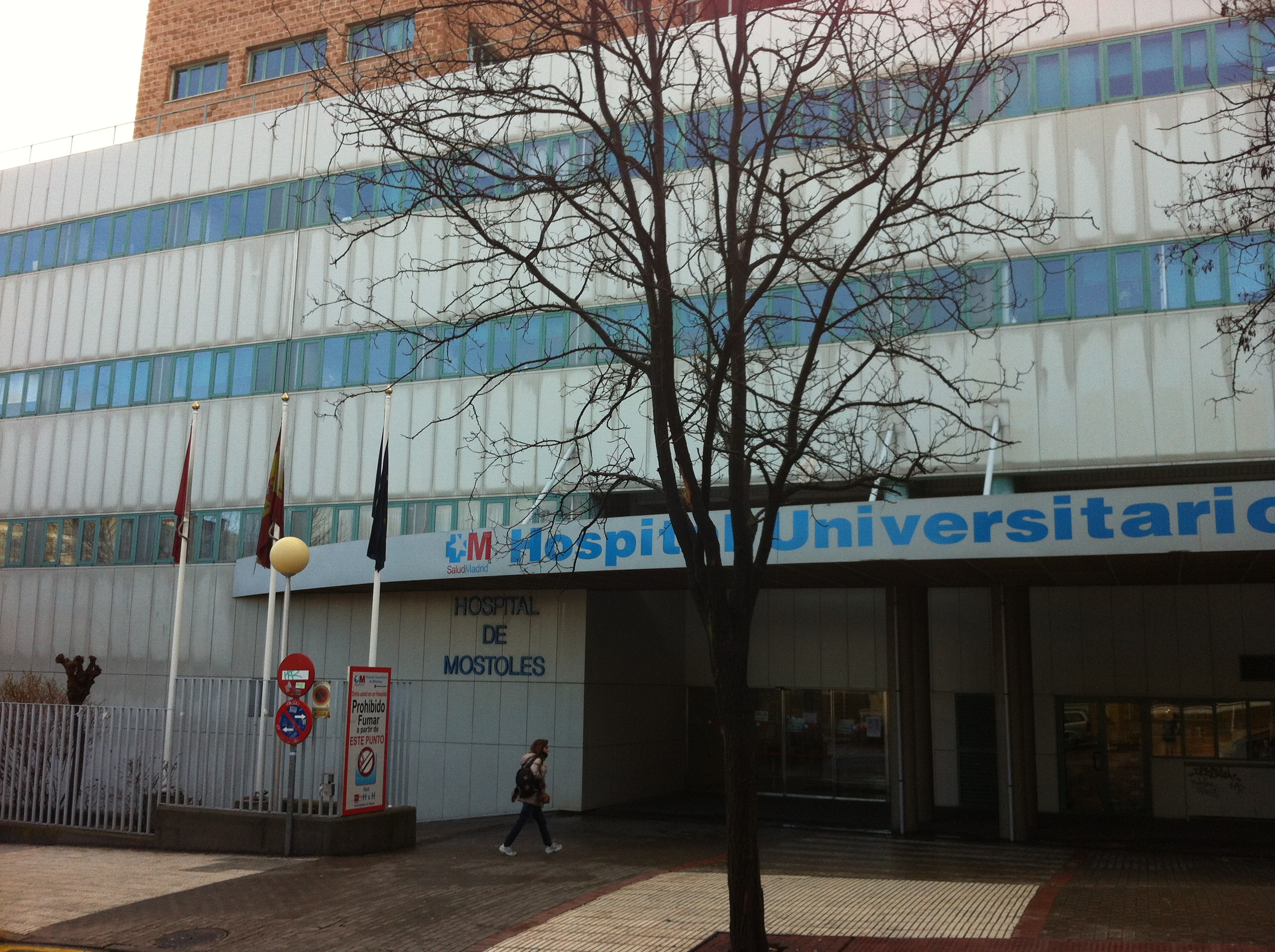 Fachada principal